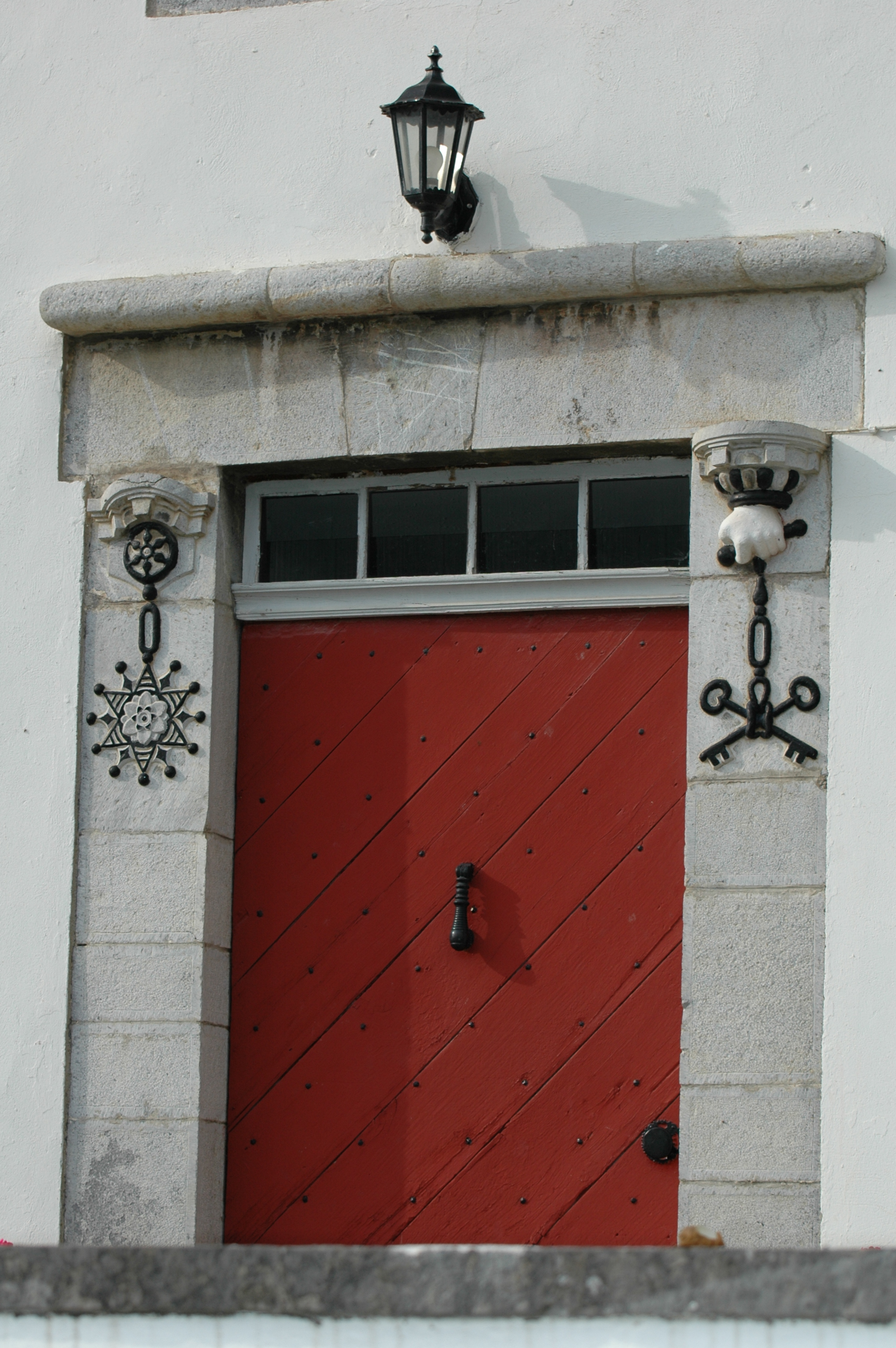 Saint-Martin-d'Arberoue, porte et sculptures